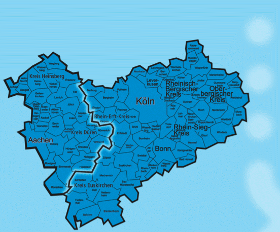 Karte des Erschließungsgebiets des Zweckverband Nahverkehr Rheinland